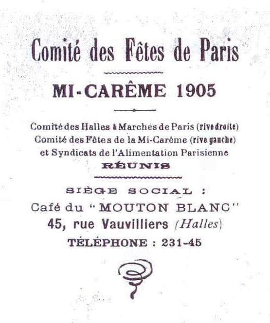 En-tête des lettres du Comité des Fêtes de Paris préparant les festivités de la Mi-Carême 1905.